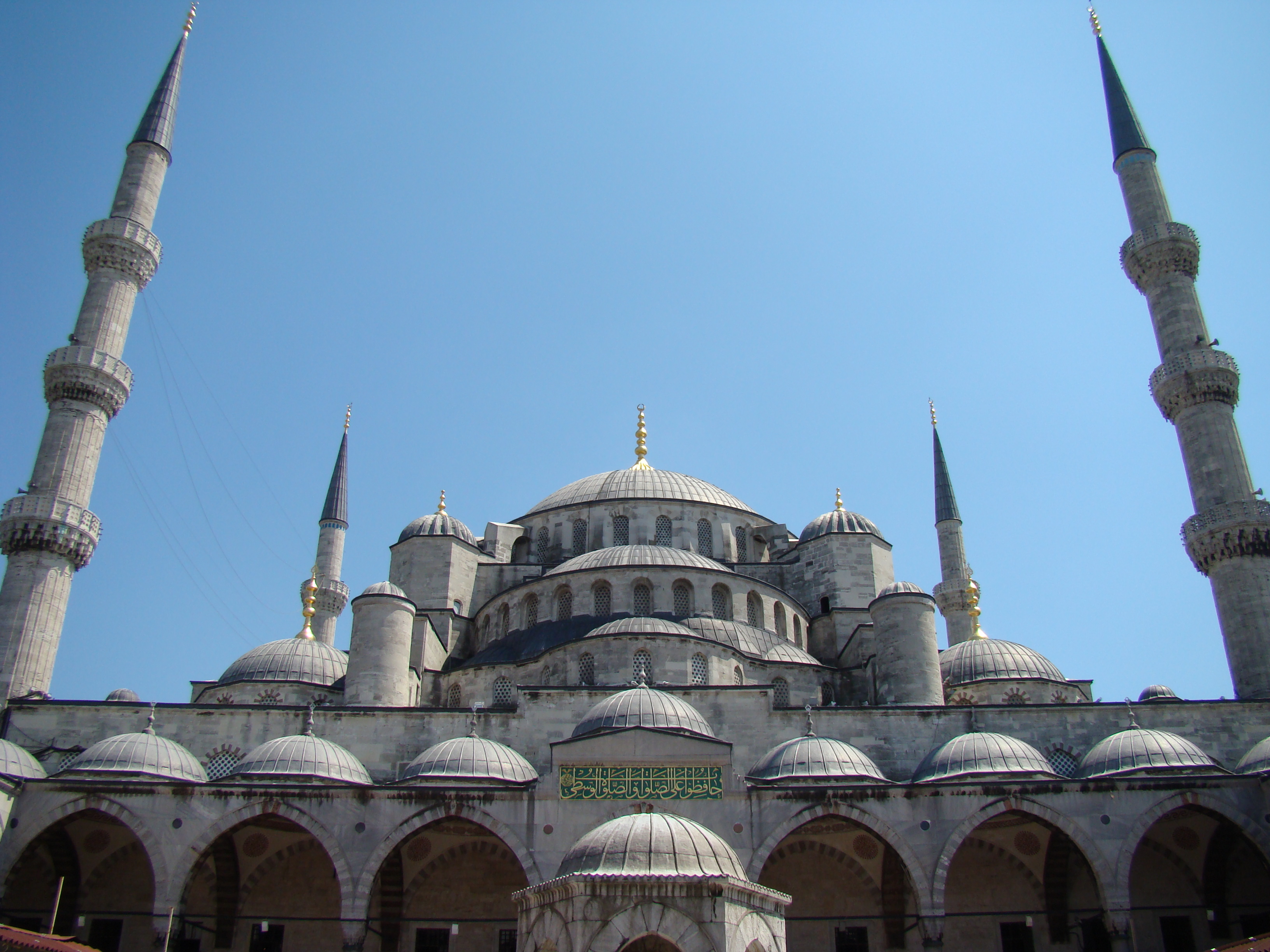 Голубая мечеть, вид со двора. 2009 год.